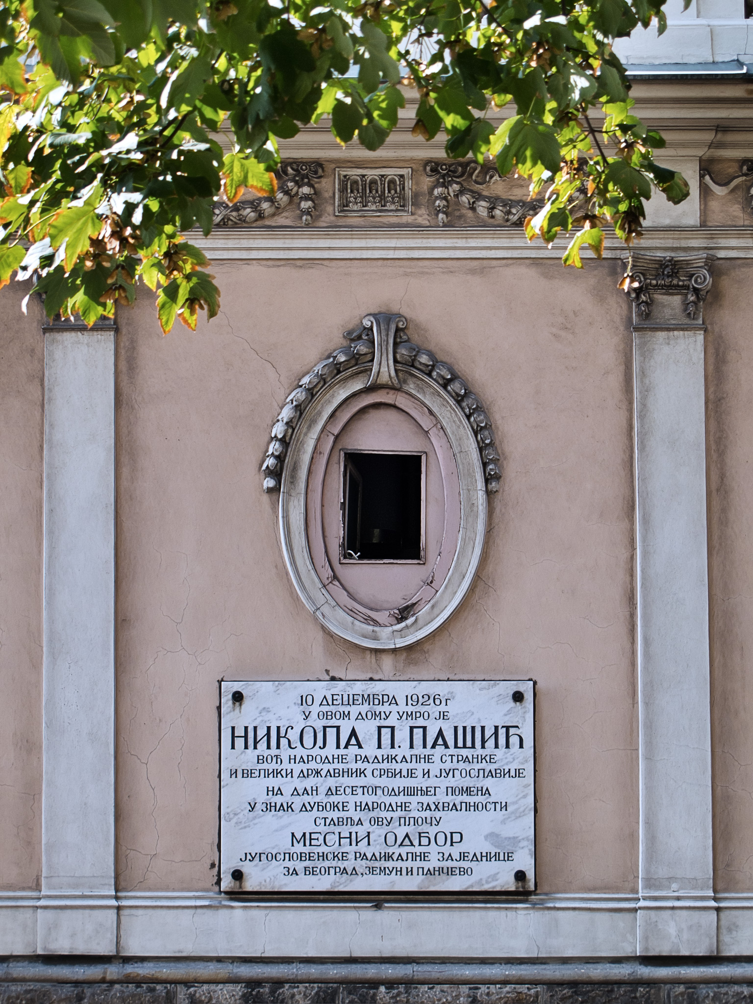 Кућа Николе Пашића (детаљ фасаде са спомен плочом), Француска 21, Стари град, Београд, Србија